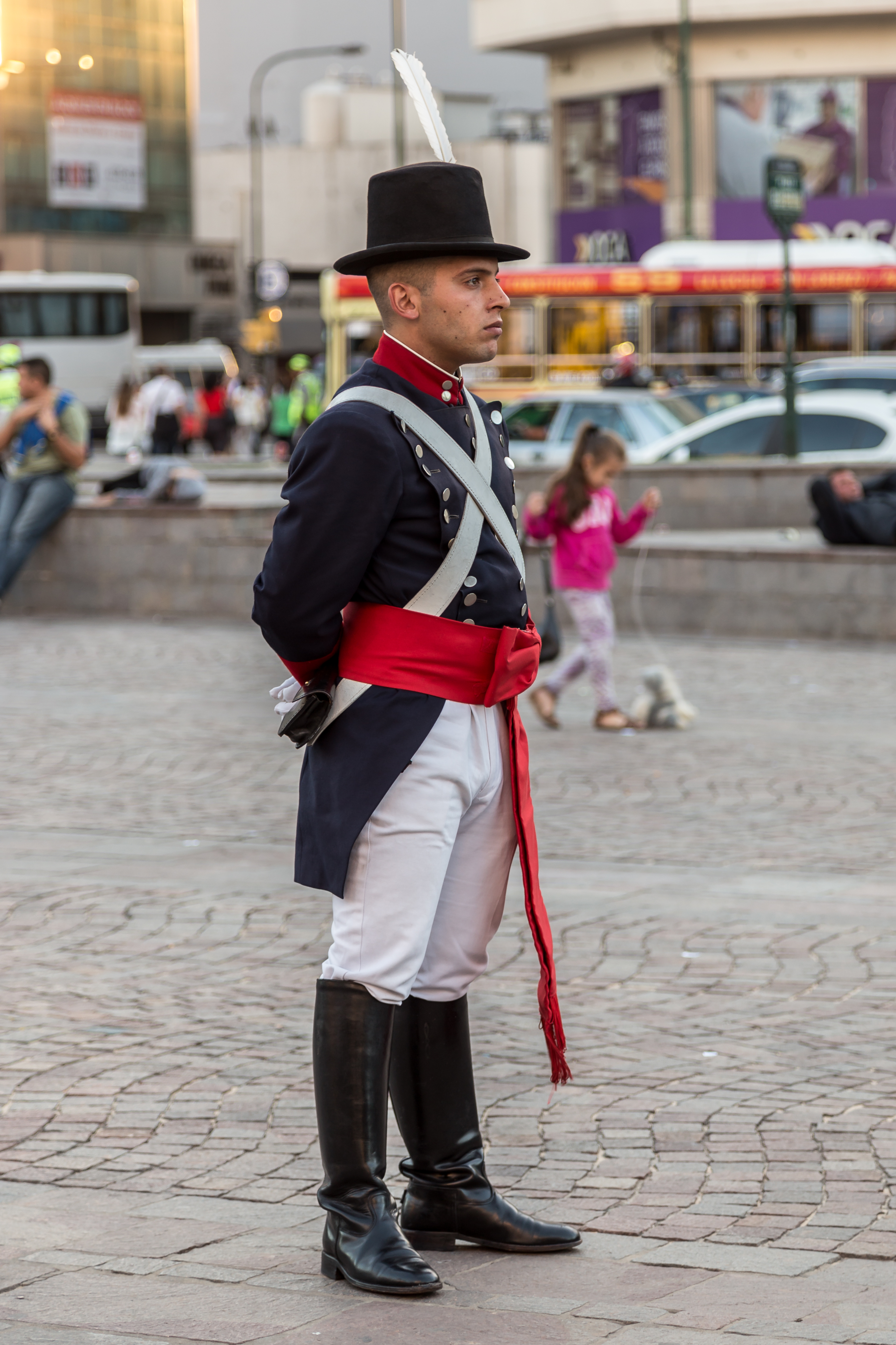 Soldados del Regimiento de Patricios arriando la bandera de la Ciudad de Buenos Aires en la Plaza de la República.